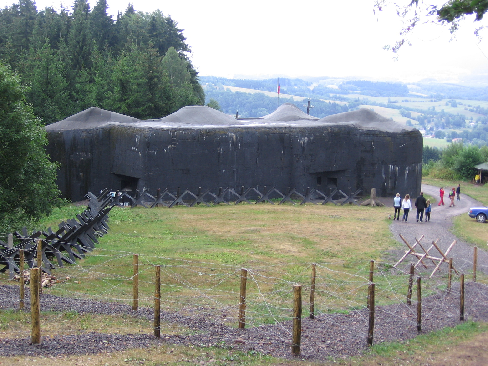 Pěchotní srub T-S 73 Polom